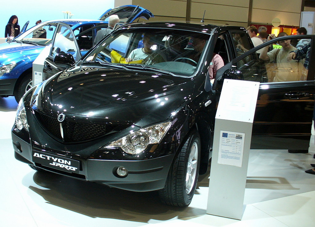 SsangYong Actyon Sports